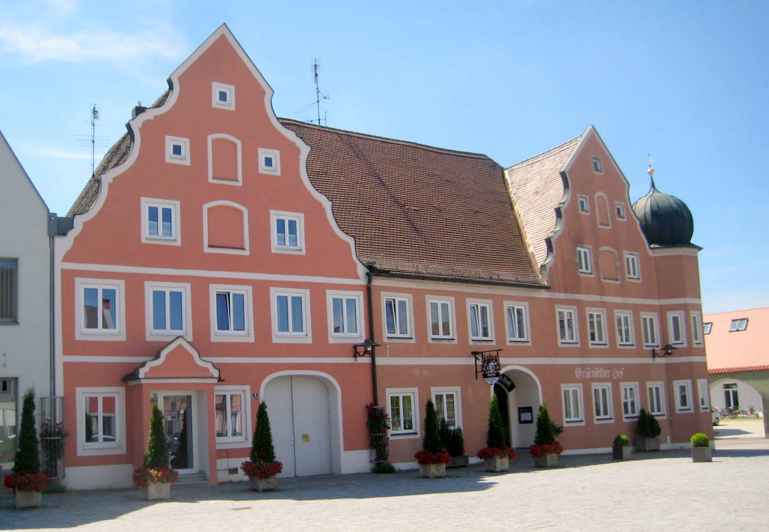 Geisenfeld ist eine Gemeinde im Landkreis Pfaffenhofen an der Ilm.